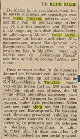 Salah satu surat kabar Hindia Belanda yang memberitakan tentang Barisan Selempang Merah yang mereka sebut dengan De Rode Sjerp tahun 1949. (Het Nieuwsblad voor Sumatra, 19 Mei 1949)